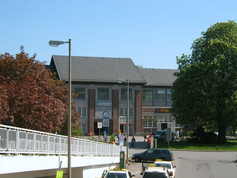 U-Bahnhof Hamburger Straße in Hamburg-Barmbek-Süd. Erbaut von Rambatz & Jollasse.